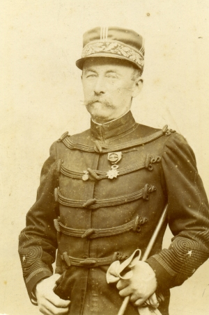 Général